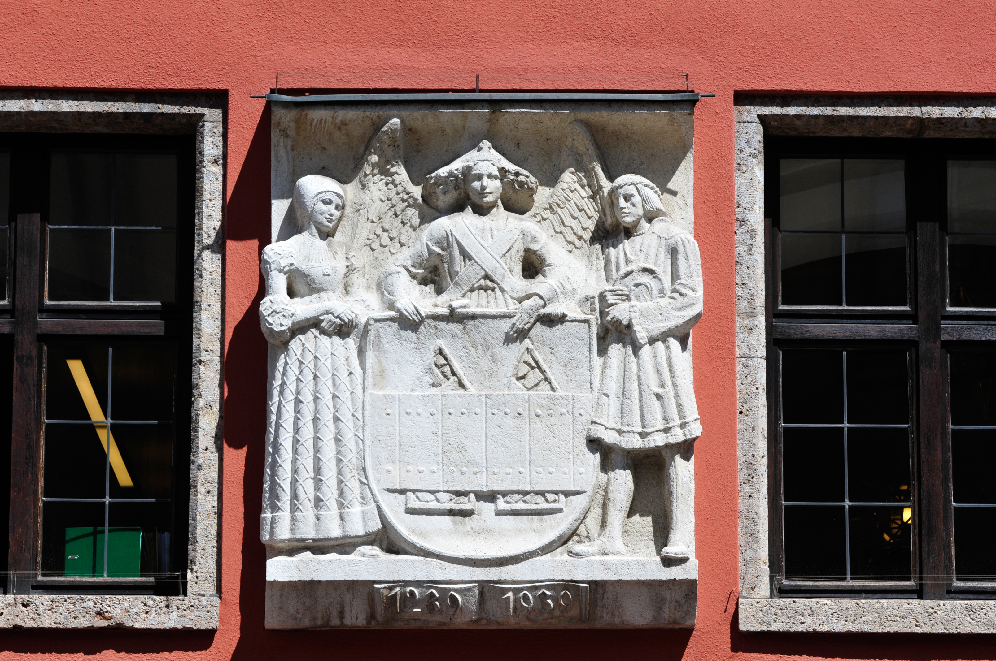 Innsbruck Im Rahmen des Fußballländerspiels Österreich gegen Rumänien bin ich einige Stunden durch Innsbruck gefahren und habe Aufnahmen gemacht, die vielleicht mal gebraucht werden könnten. --Ralf Roleček 11:20, 10 June 2012 (UTC) The making of this work was supported by Wikimedia Austria. For other files made with the support of Wikimedia Austria, please see the category Supported by Wikimedia Österreich.